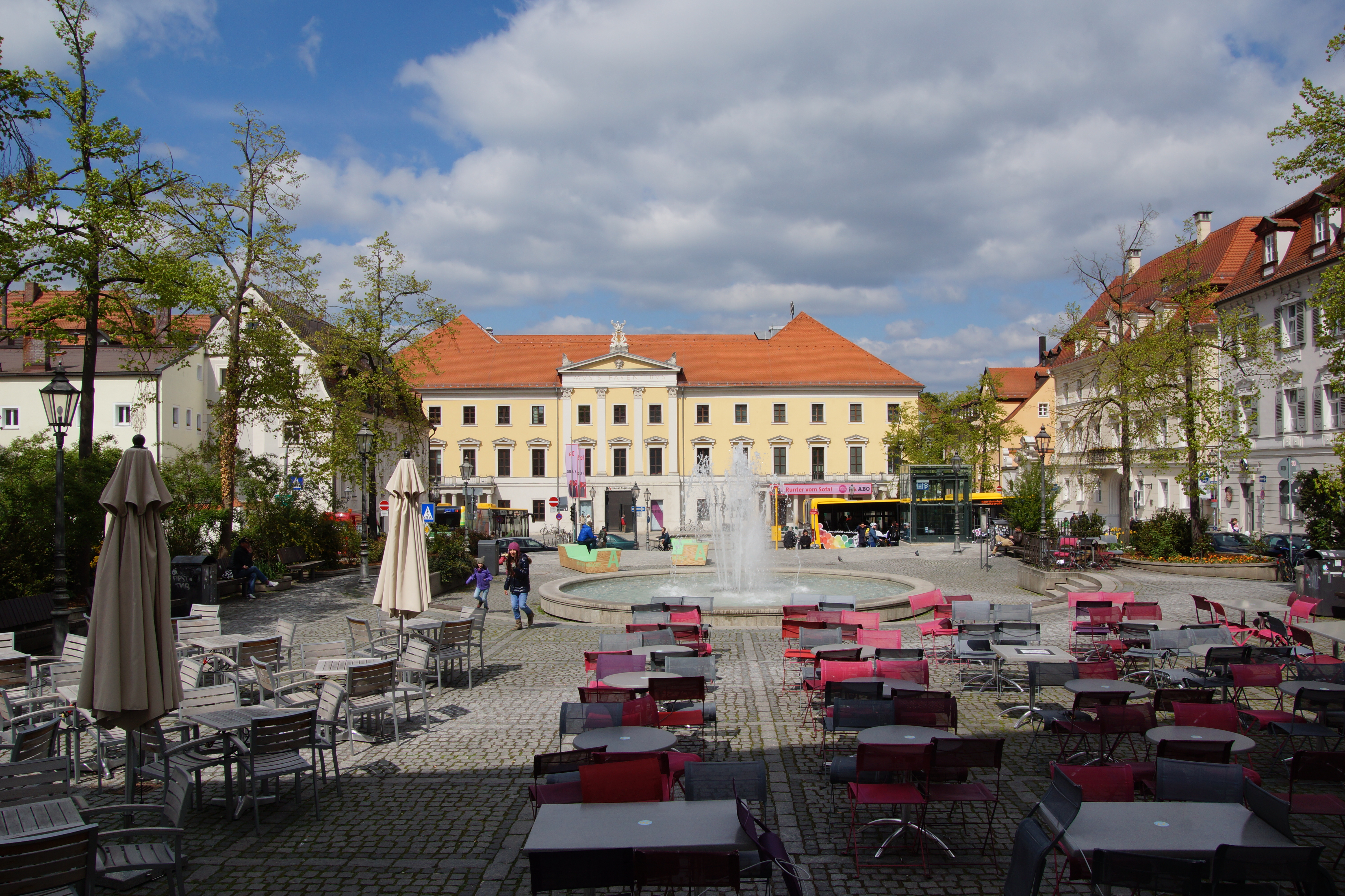 Der Bismarckplatz in Regensburg: Blick auf das Stadttheater